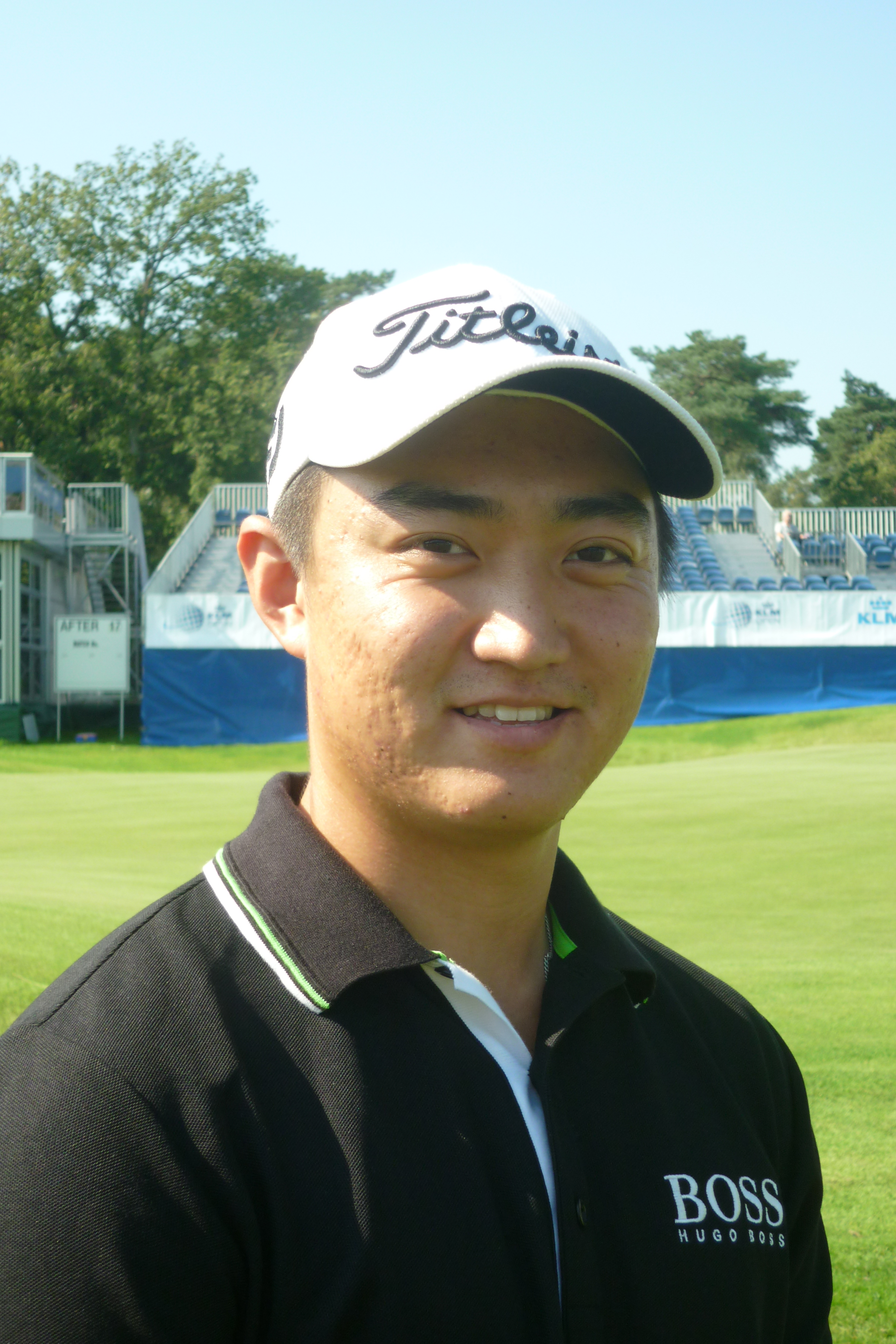 Jin Jeong